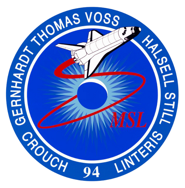 STS-94 insignia